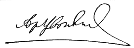 Беларуская (тарашкевіца): Аўтограф Аляксандра Цьвікевіча